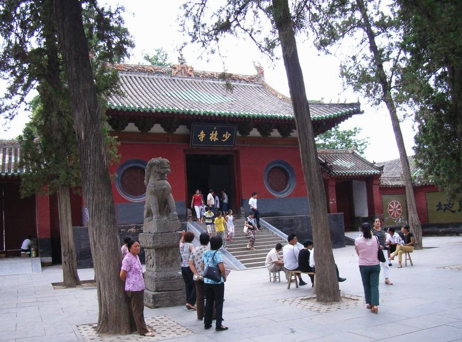 少林寺，User:Baiqitun摄于2005年8月2日。